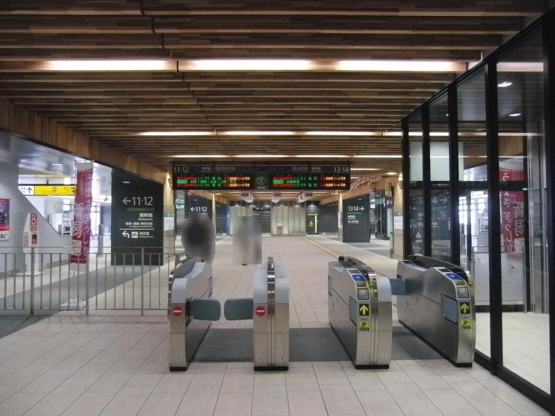 上越妙高駅新幹線の改札口です。